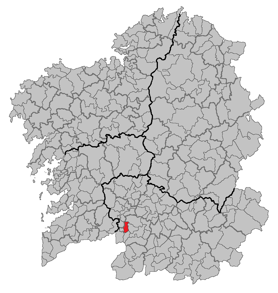 Mapa coa localización do concello de Gomesende.